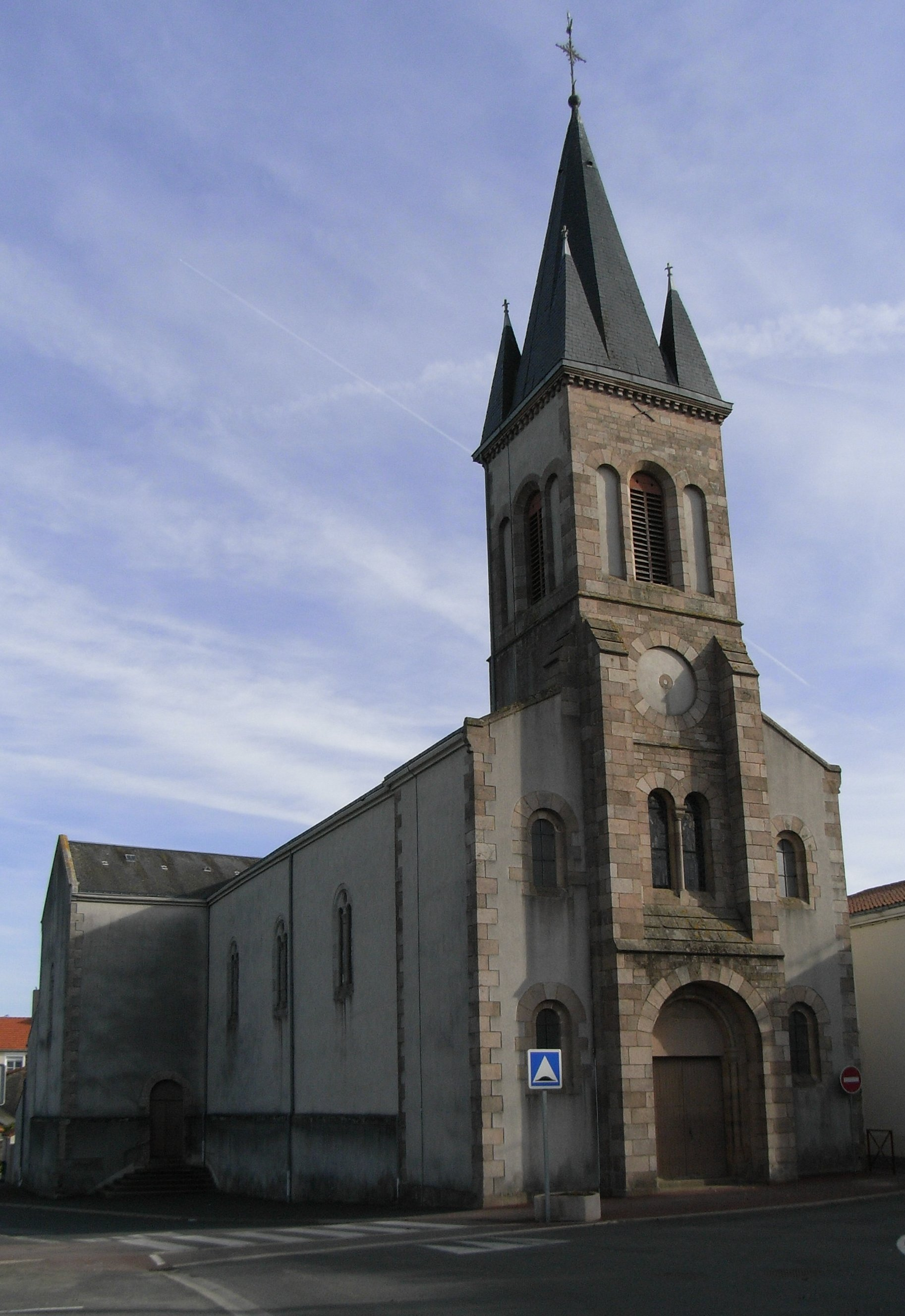 Église de Saint-André-de-la-Marche dans le Maine-et-Loire.